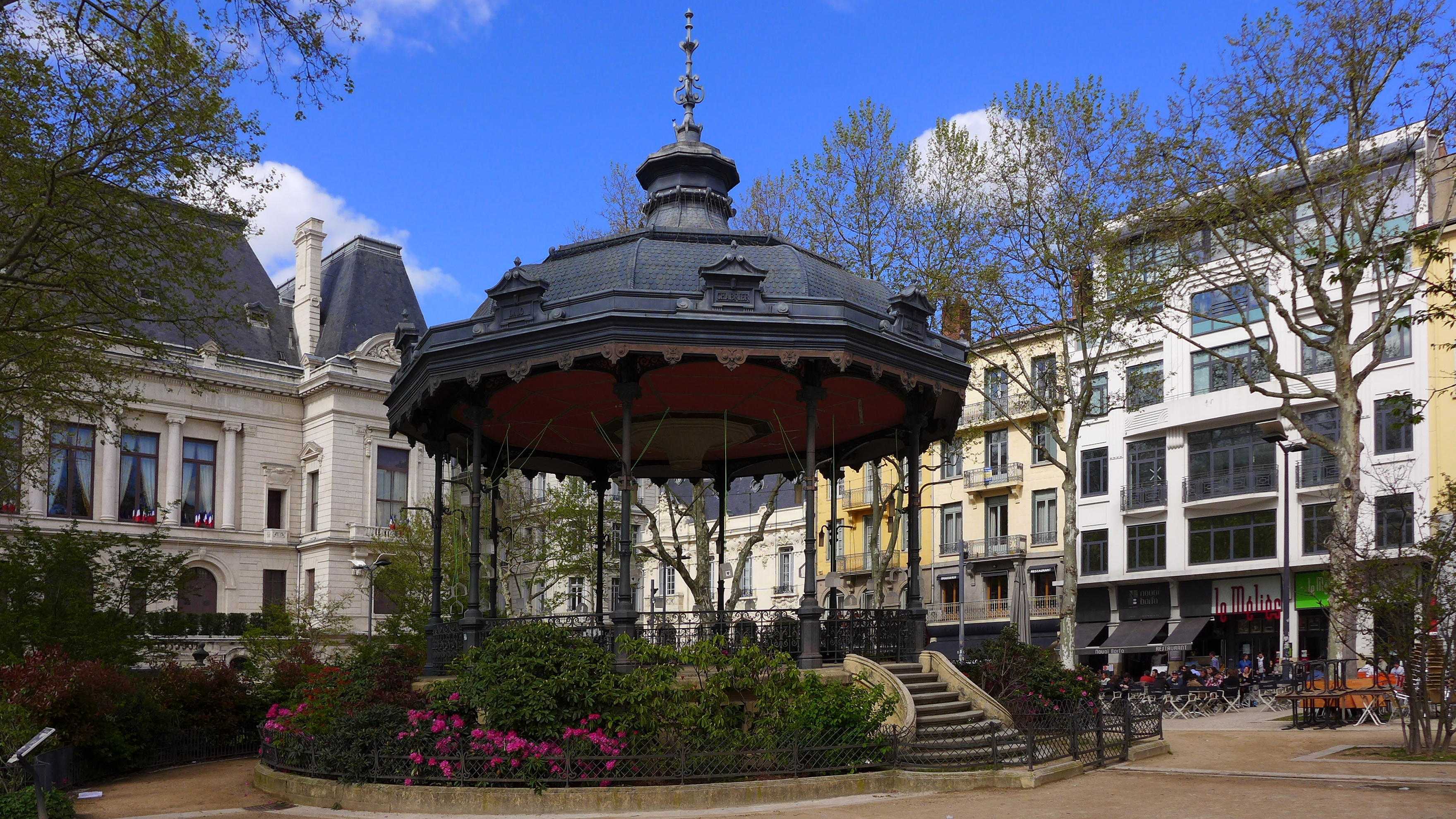 Vue du kiosque à musique situé place Jean Jaurès (autrefois appelée place Marengo) à Saint-Etienne, chef-lieu du département de la Loire. A noter qu'autour du toit de l'édicule, on peut observer des cartouches contenant chacun le nom d'un compositeur dont Massenet, stéphanois d'origine. .